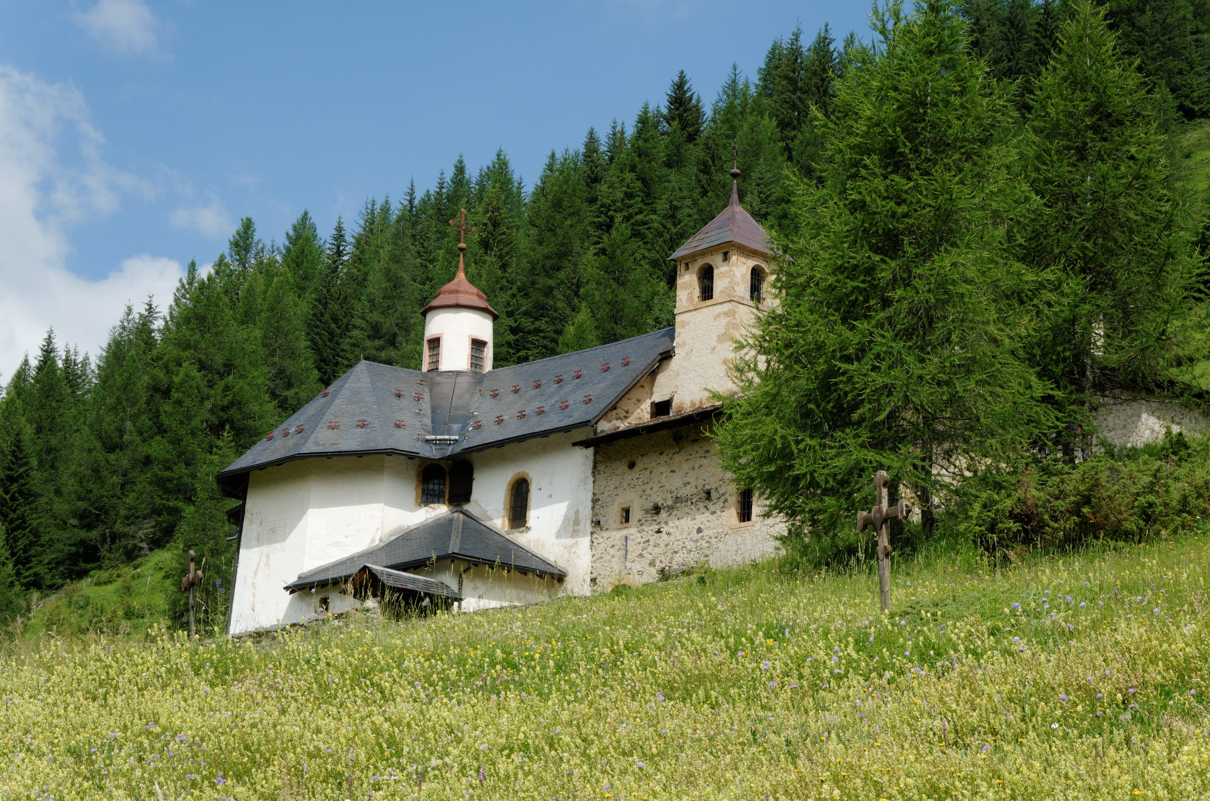 Sanctuaire de Notre-Dame des Vernettes (Inscrit) .